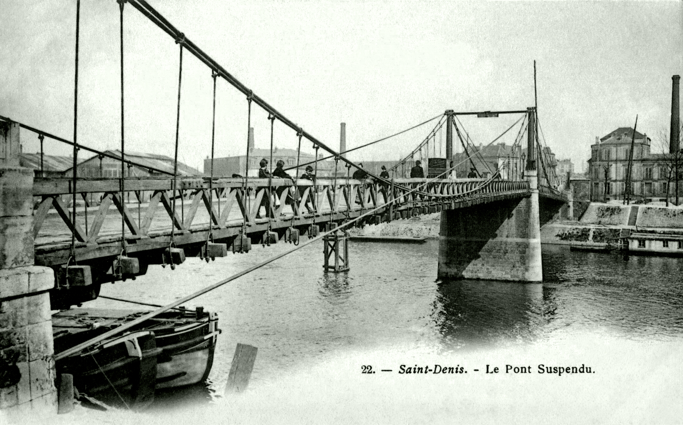 Carte postale ancienne éditée par Marmuse, N°22 Le pont suspendu sur la Seine reliant Saint-Denis et l'Île Saint-Denis, Construit en 1844 par Marc Seguin et freres, remplacé par le Pont de Formigé en 1905